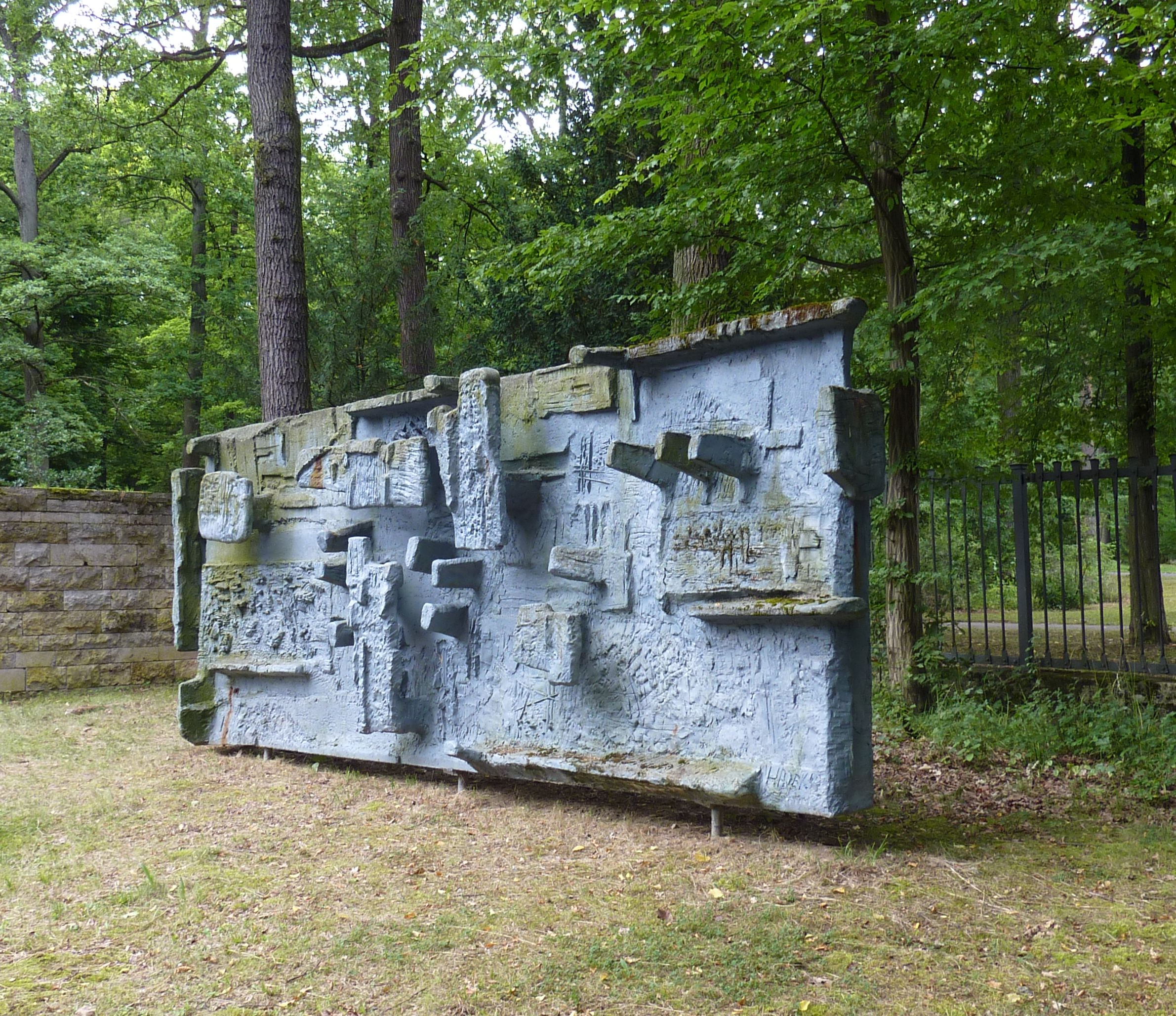 Kunstwerk am Waldfriedhof